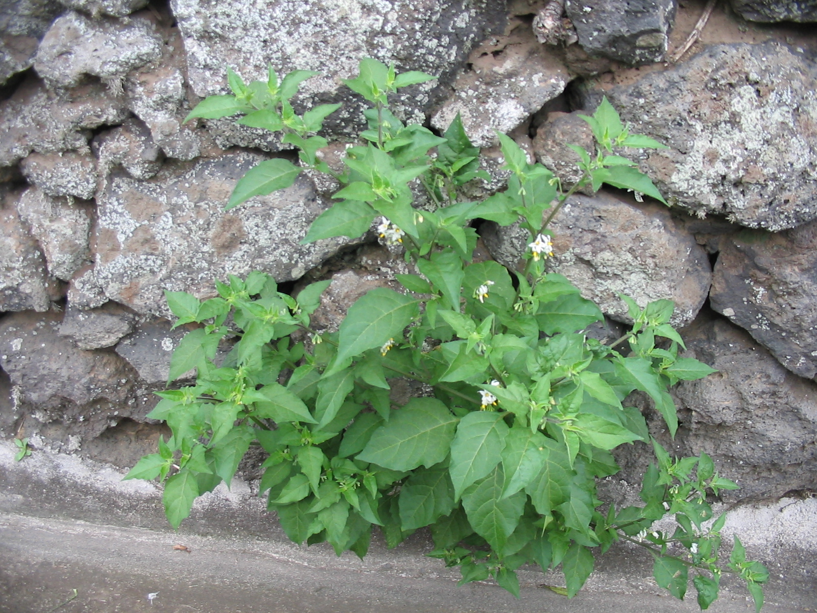 Solanum chenopodioides - Habitus